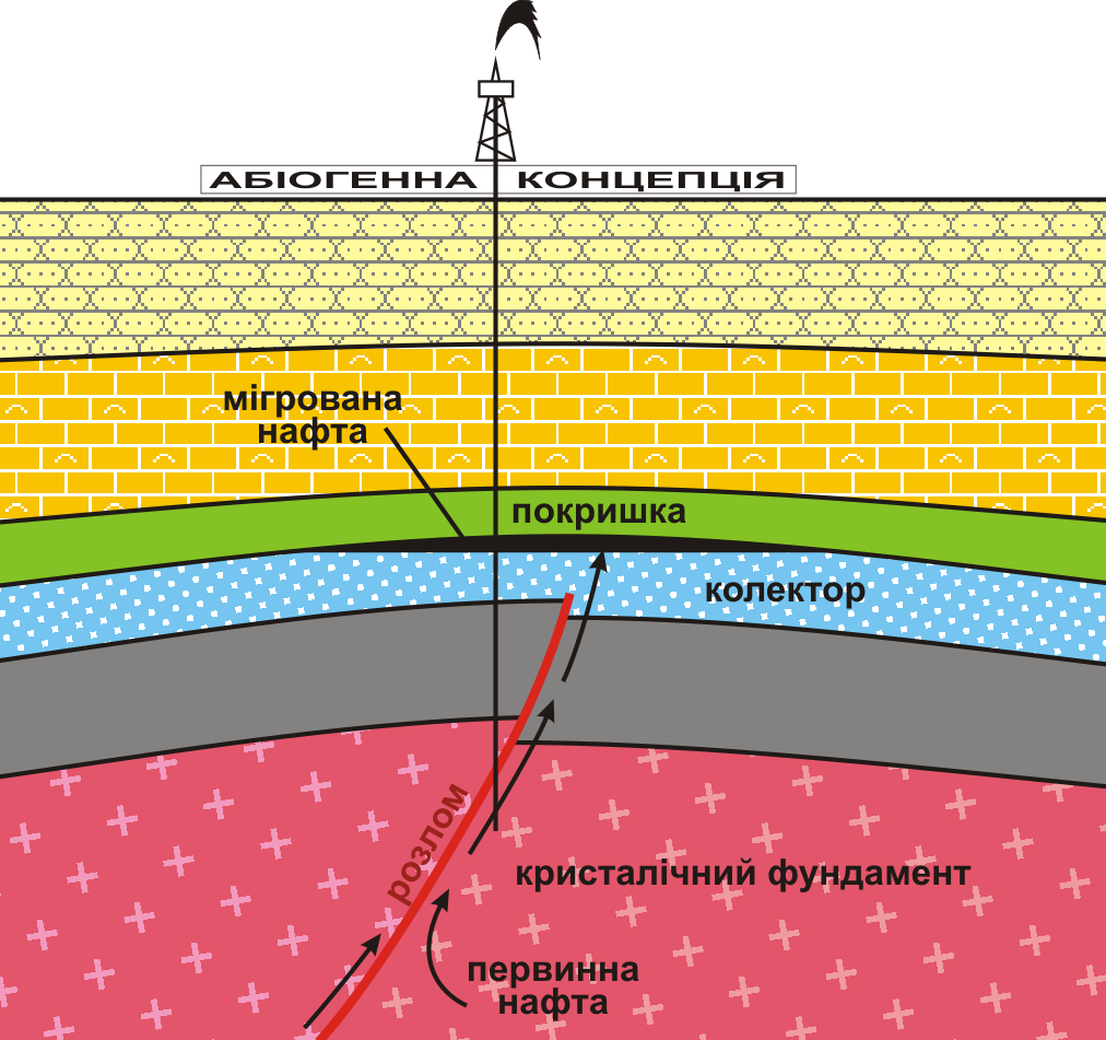 Схема абіогенної концепції походження нафти і газу